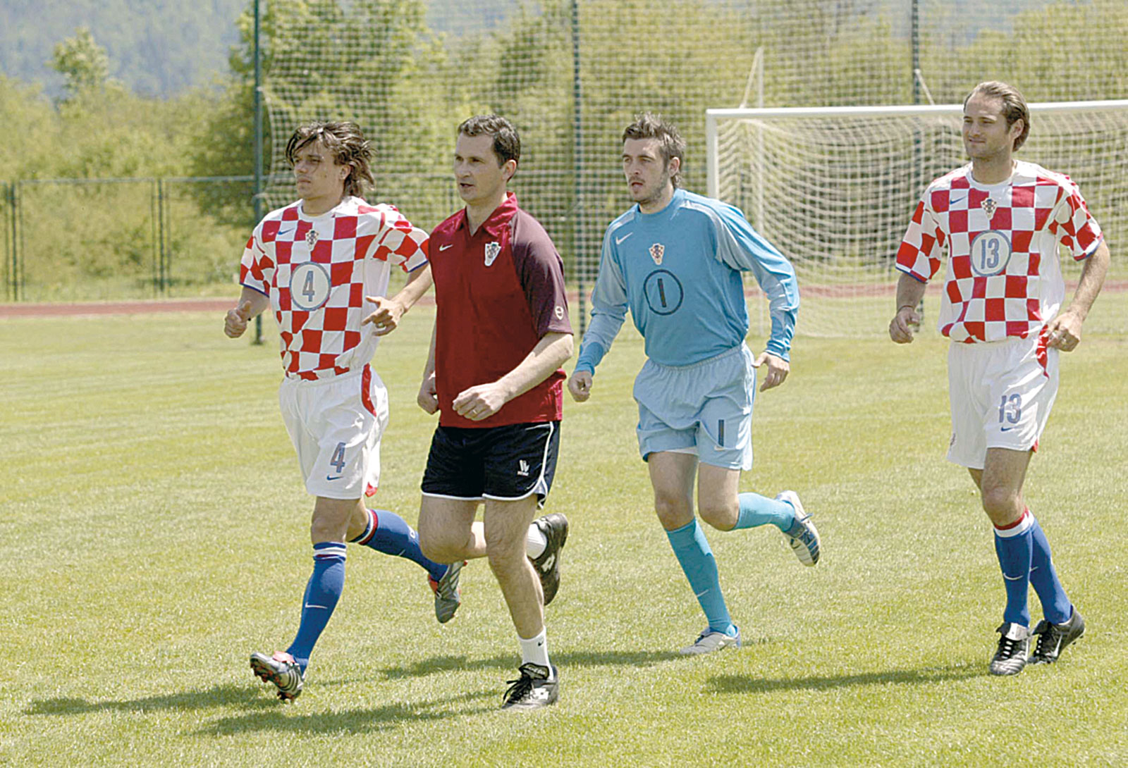 Dragan Primorac, Zvonimir Boban, Ivano Balić, Franjo Arapović i učenici na športskom natjecanju - Dragan Primorac and Croatian National Football Team